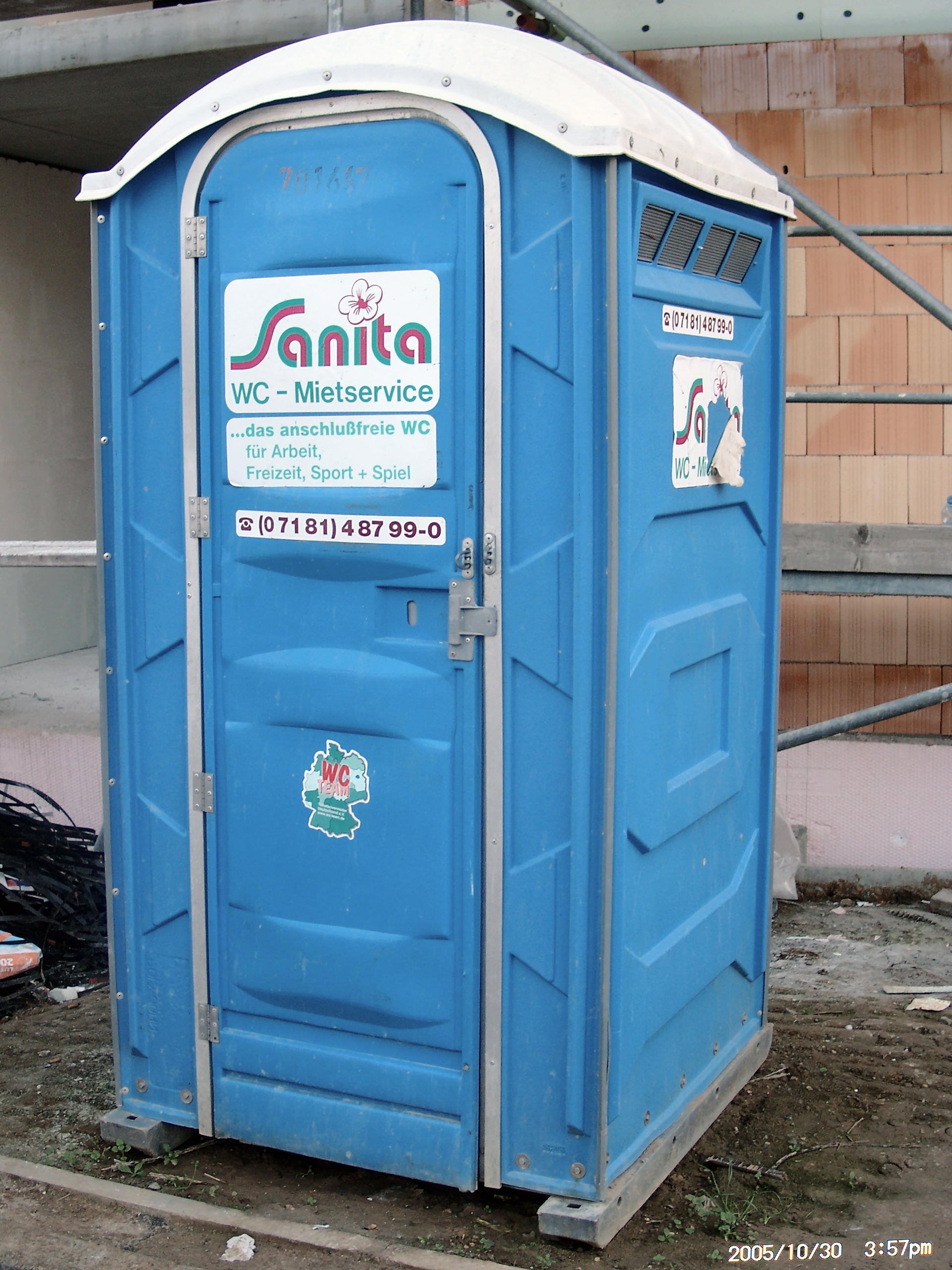 Sanita-Toilette